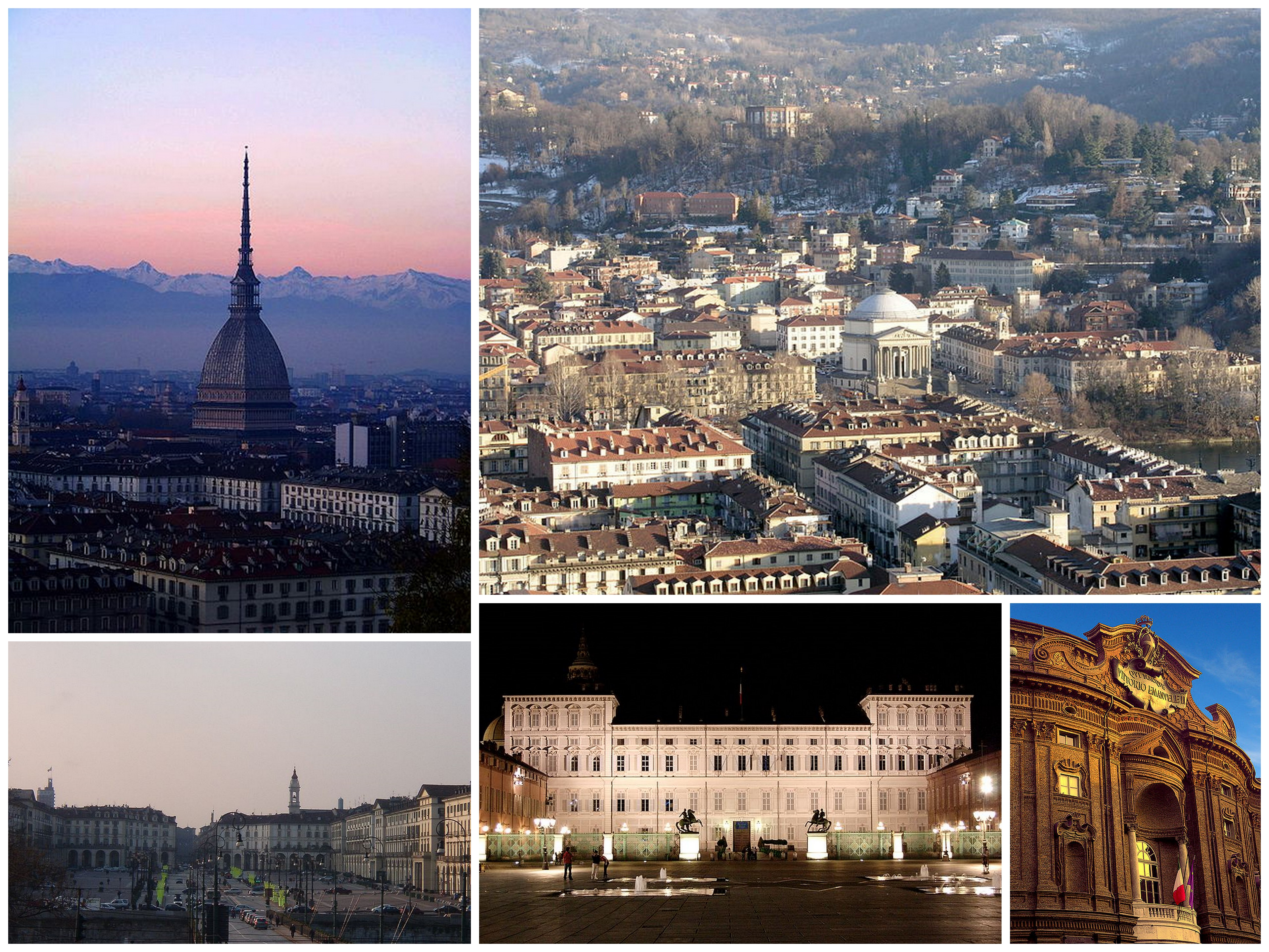 Collage di varie foto di Torino